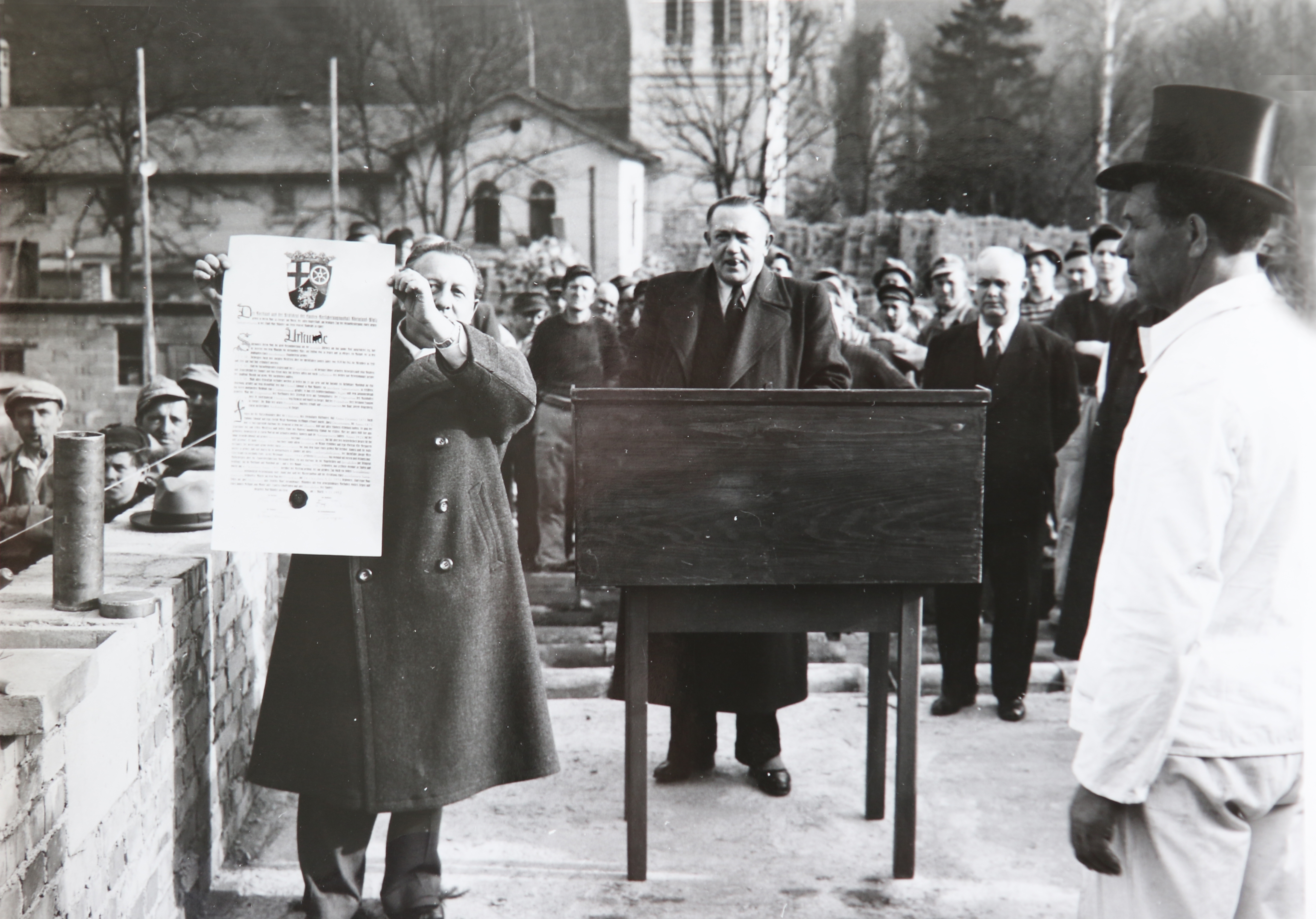 Grundsteinlegung für den Neubau des Sanatoriums in Bad Münster am Stein, 1951. Foto: DRV Rheinland-Pfalz.